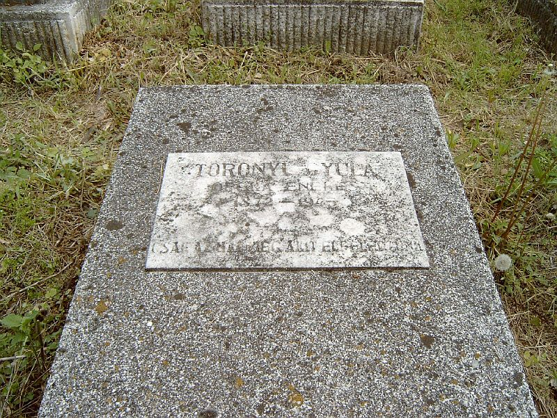 Toronyi Gyula (Budapest, 1872. szeptember – Budapest, 1945. július 27.) operaénekes (tenorista) sírja Budapesten. Új köztemető: 28-7-36.